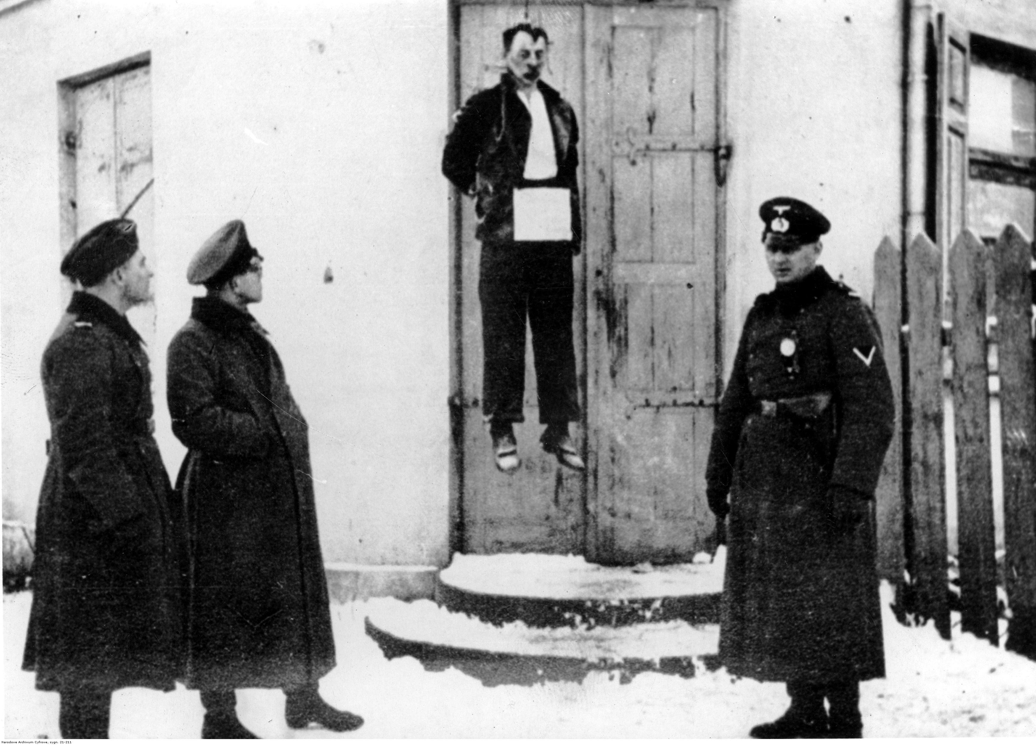 Antoni Bartoszek powieszony przez Niemców przed wejściem do swojej restauracji w Wawrze koło Warszawy i policjanci niemieccy.